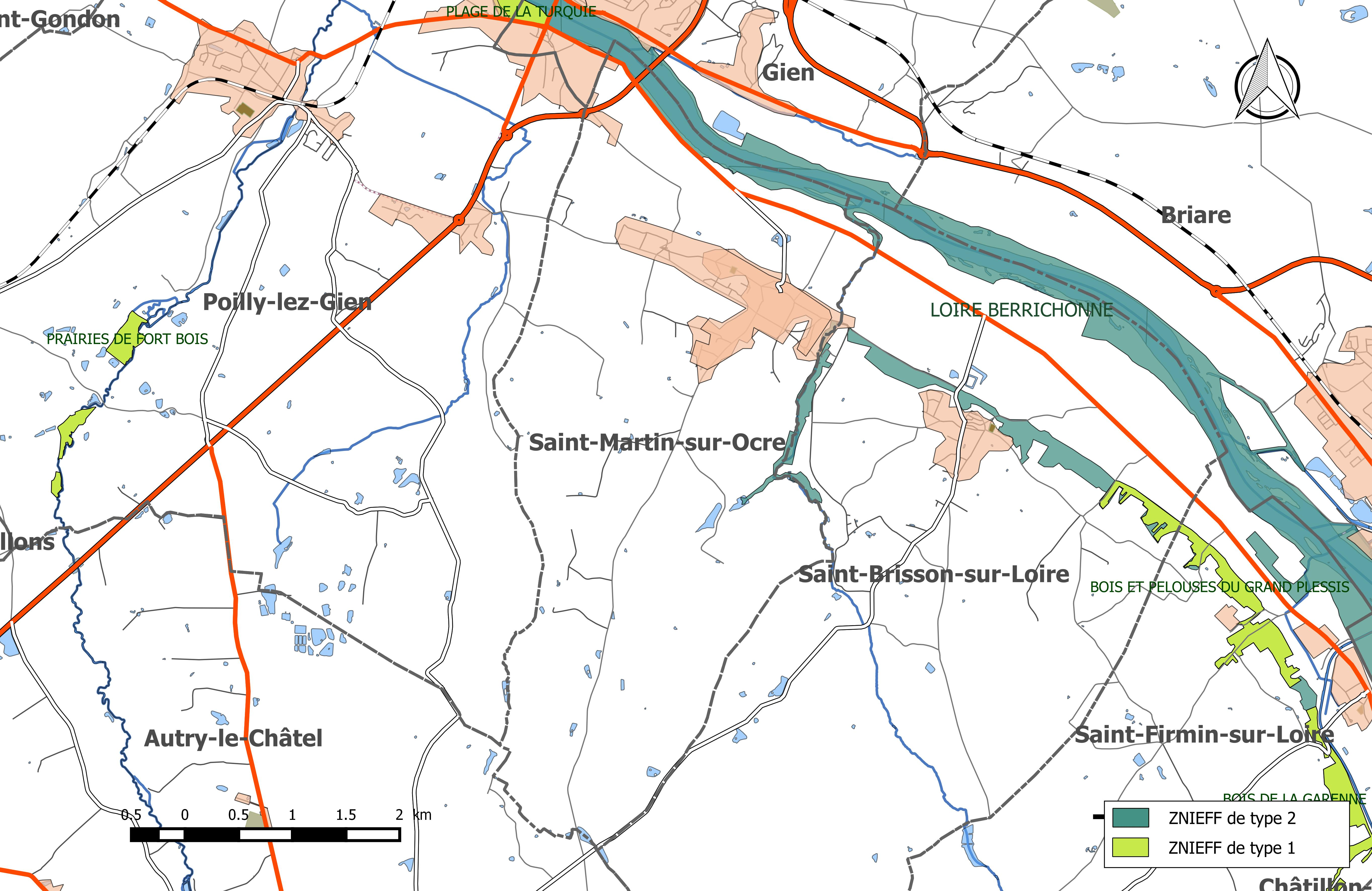 Carte des Zones naturelles d'intérêt écologique faunistique et Floristique (ZNIEFF) de la commune de Saint-Martin-sur-Ocre (Loiret).